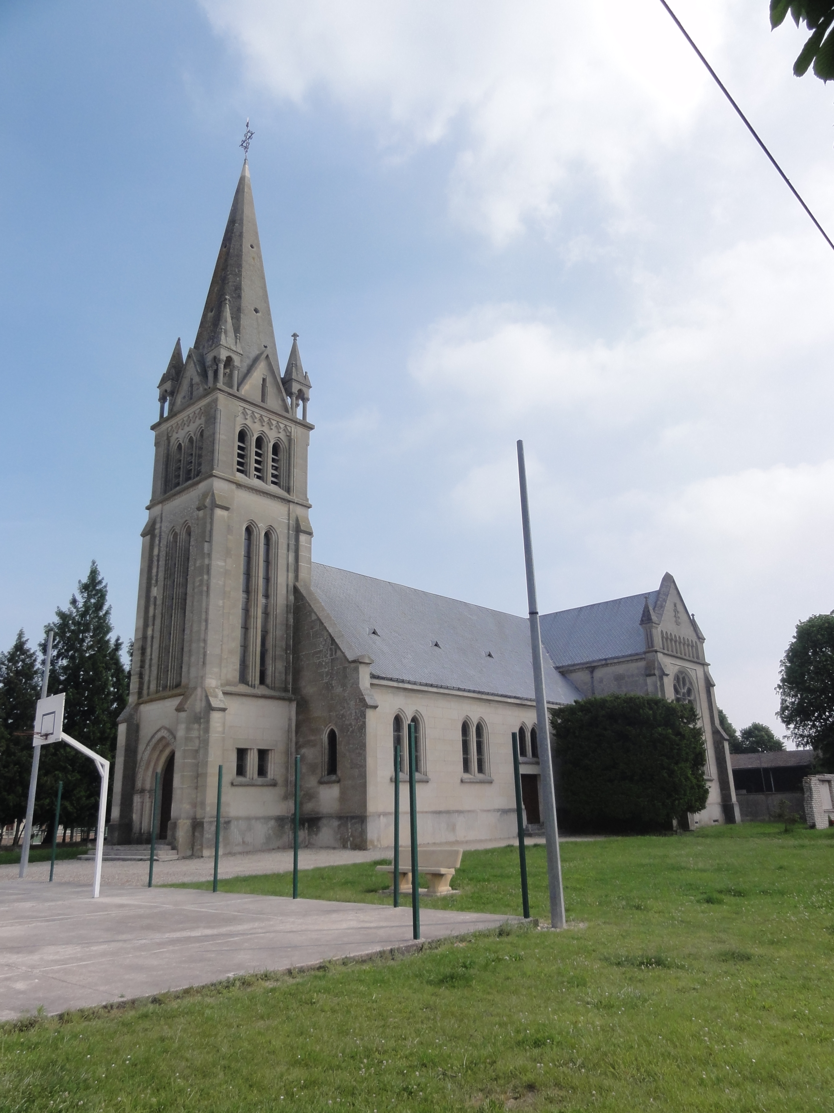 Berry-au-Bac (Aisne) Église .